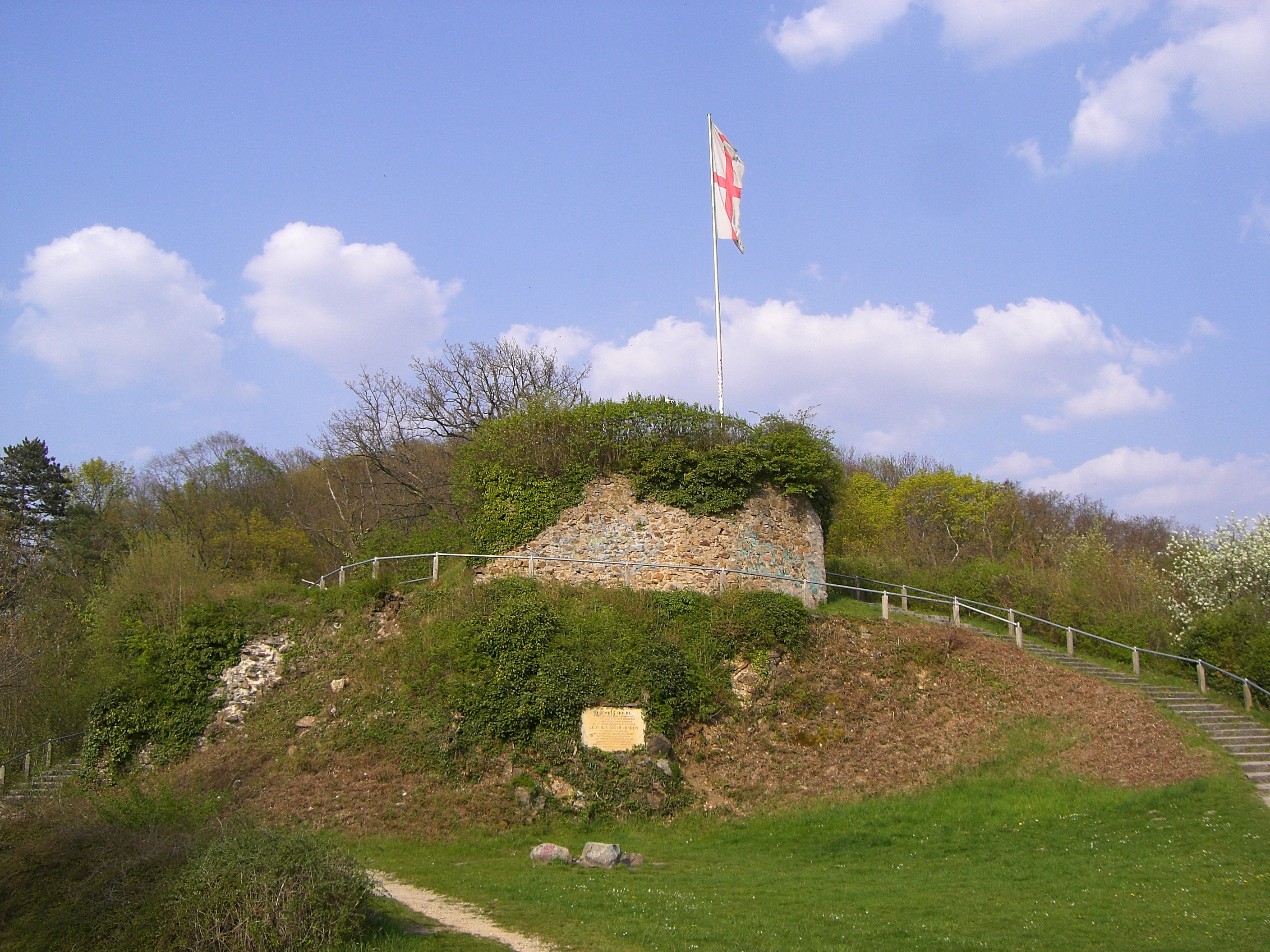 Ludwigshöhe auf dem Schlossberg Freiburg im Breisgau